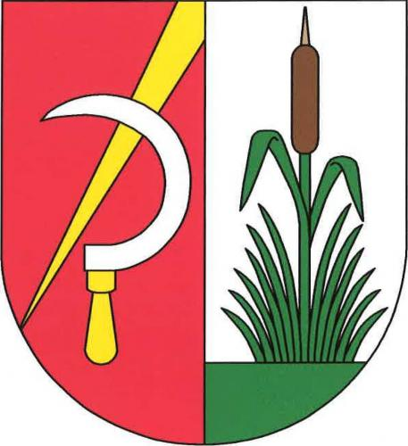 znak, Podbořanský Rohozec, okres Louny